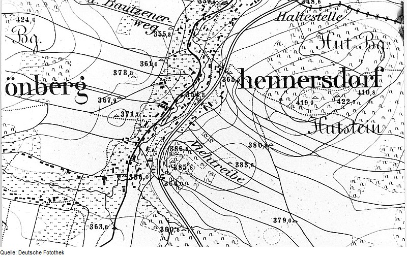 Original image description from the Deutsche Fotothek Dürrhennersdorf. Meßtischblatt, Sekt. Neusalza, 1883